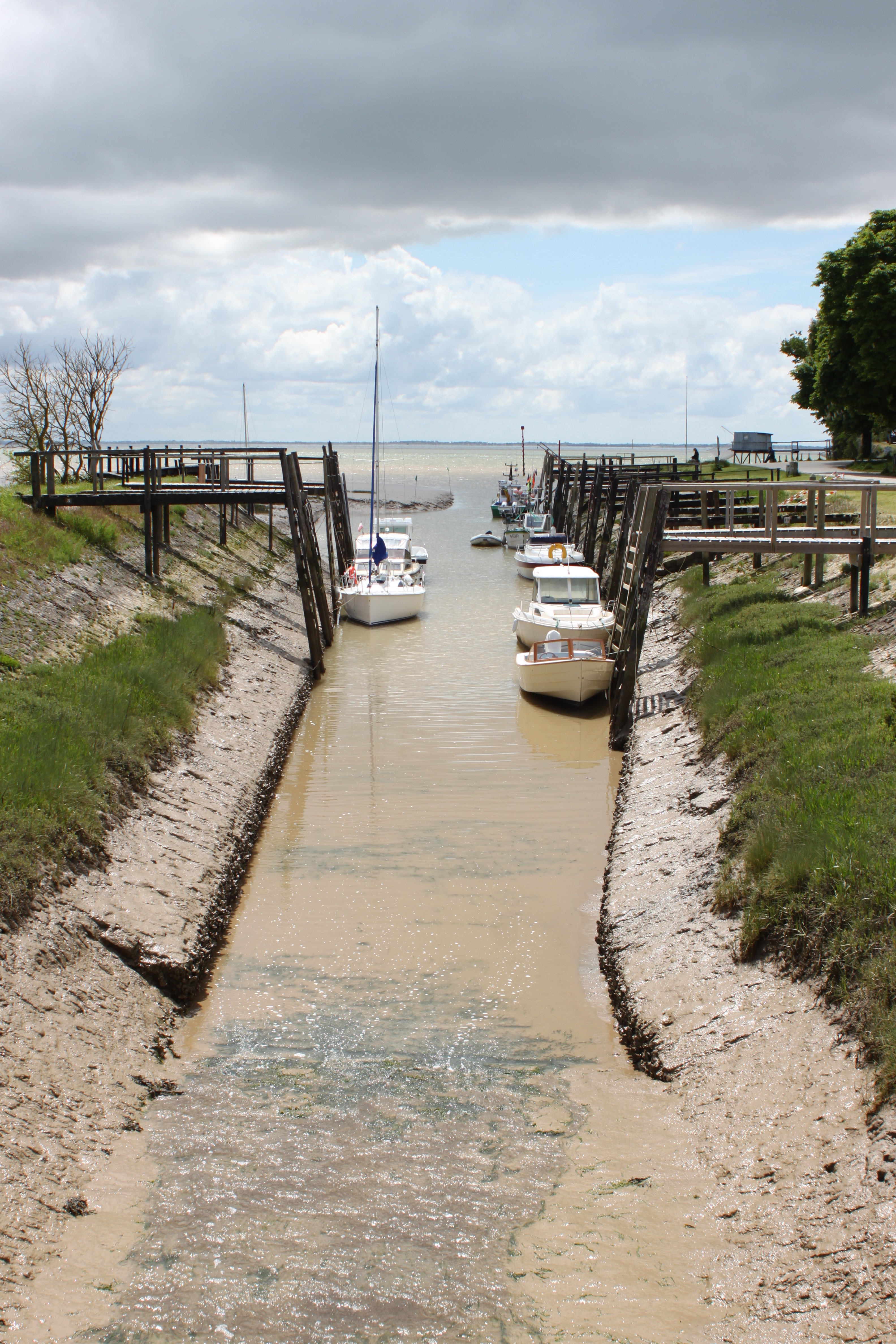 Port, à marée basse, Fr-17-Talmont-sur-Gironde.